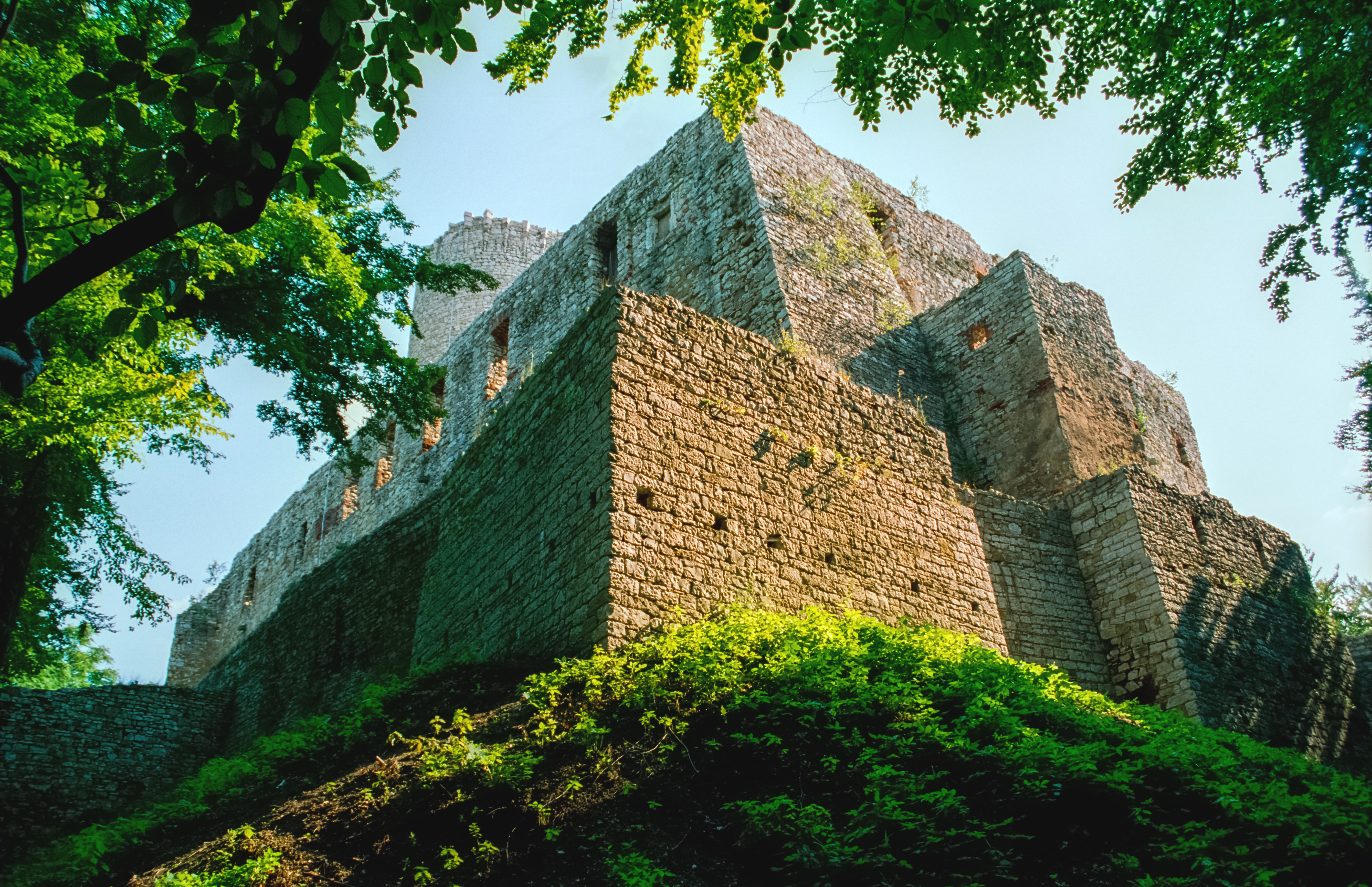 Poland, Jura, Lipowiec Castle